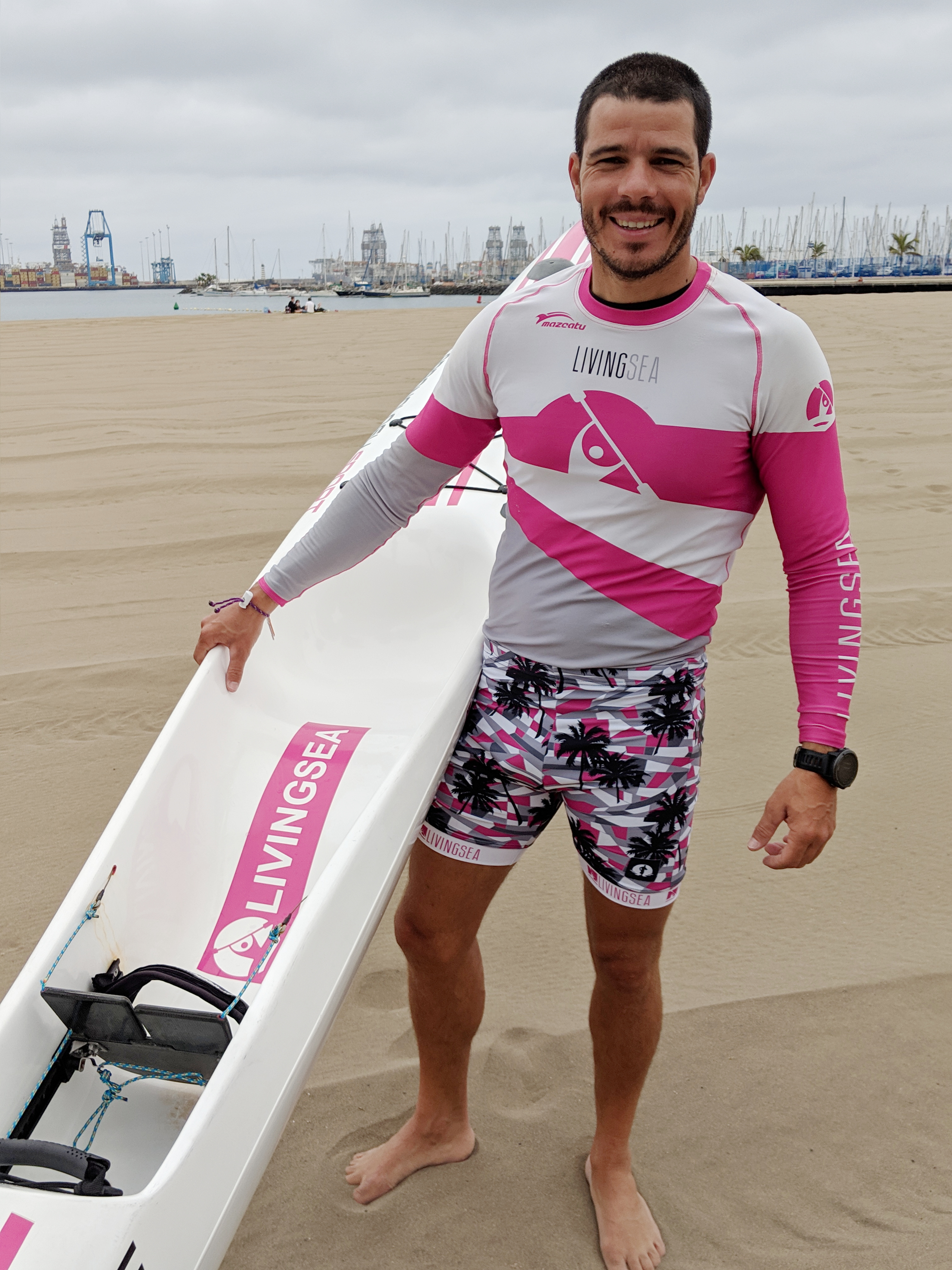 Esteban Medina Ojeda, piragüista canario del Club de Amigos del Piragüismo